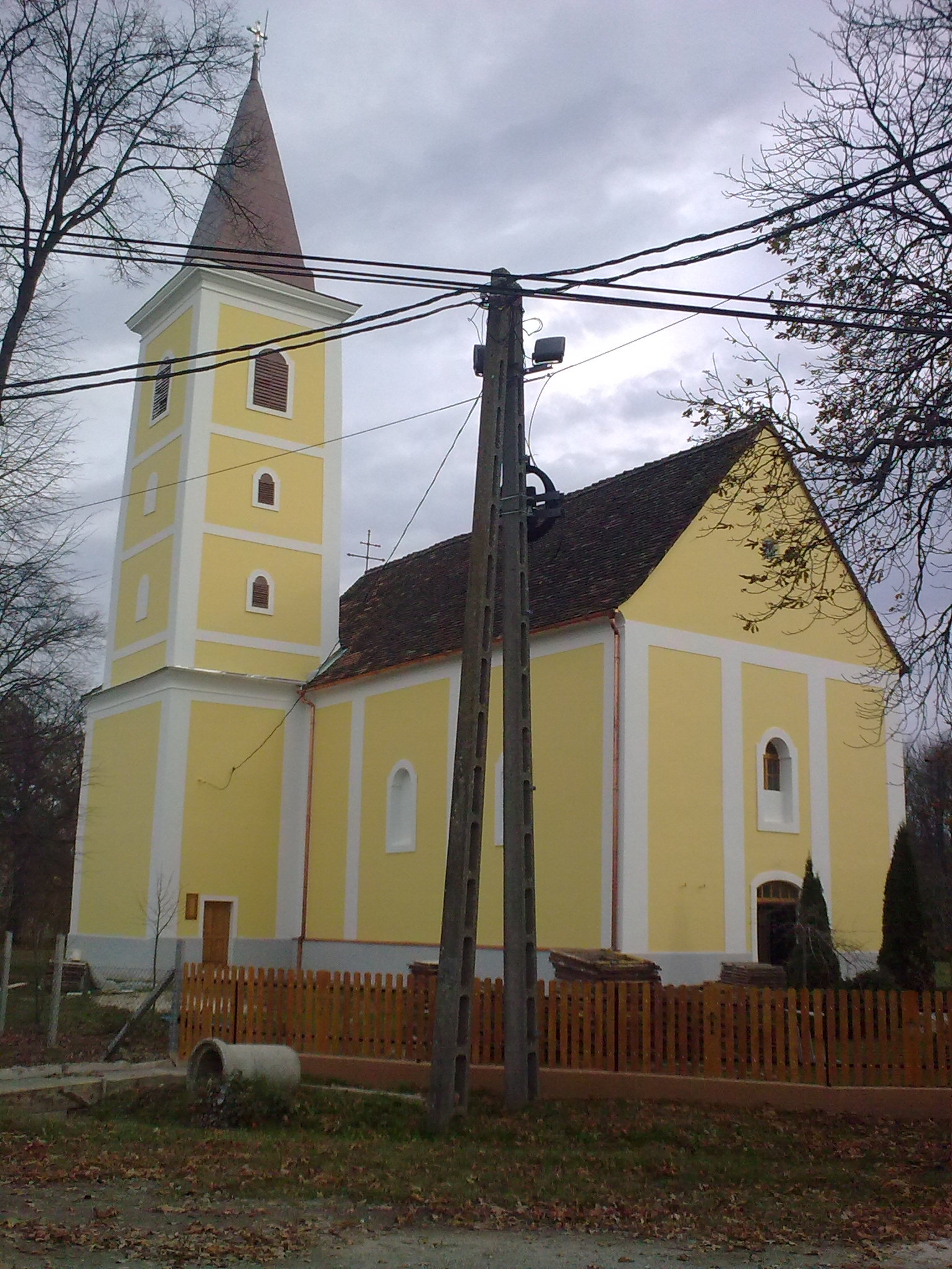 Szent József-templom, Katolikus templom